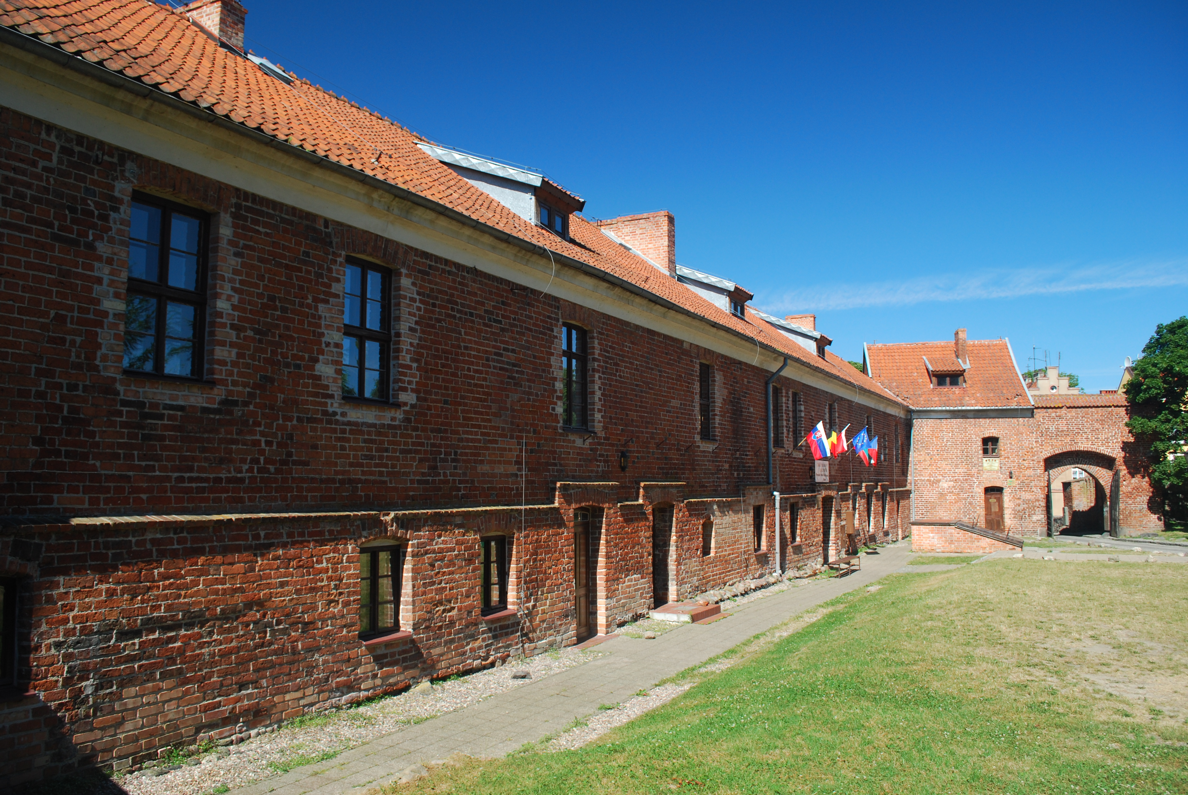 Zamek Krzyżacki w Sztumie.